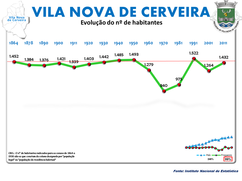 Censos 1864/2011